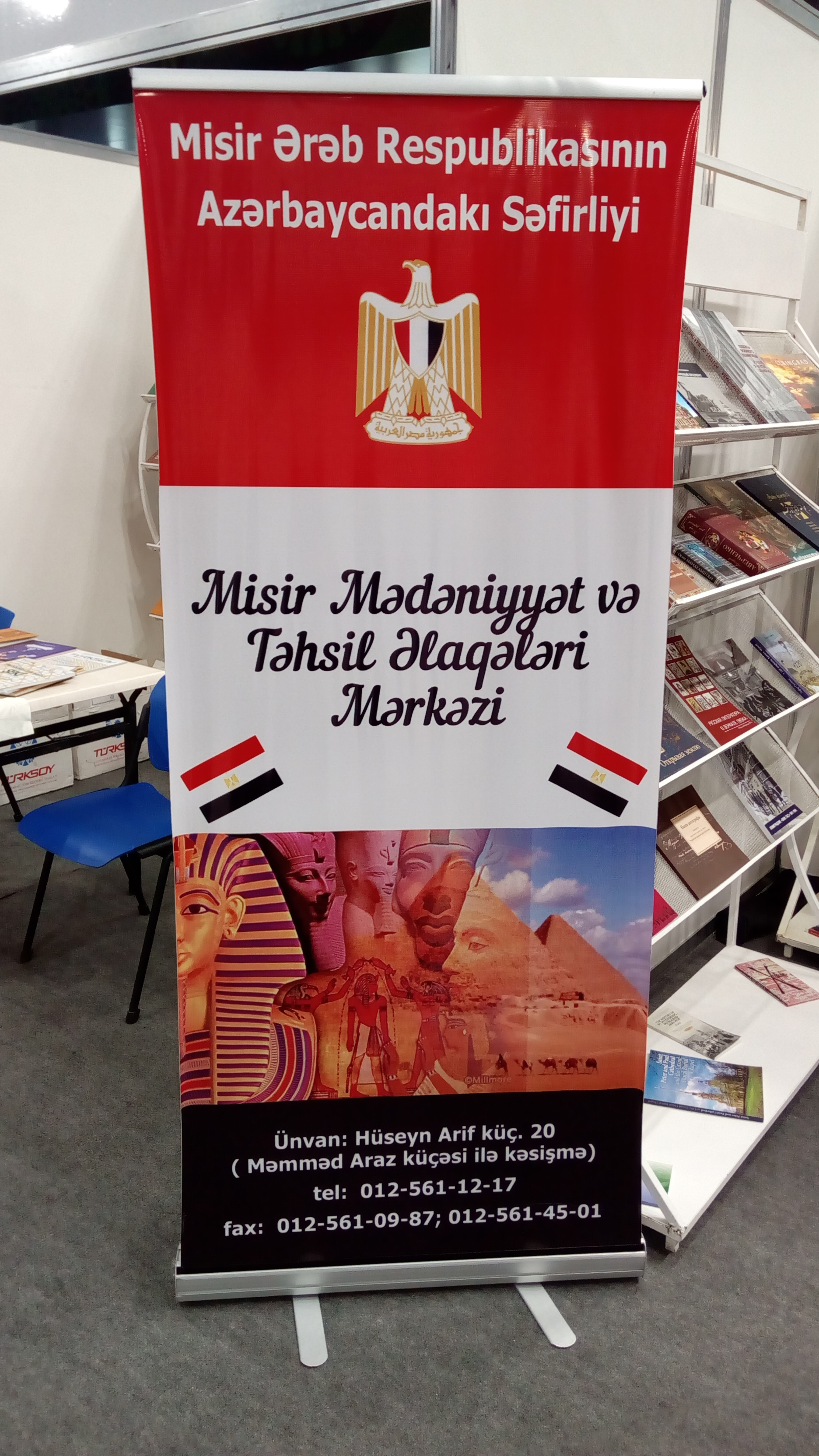 V Bakı Beynəlxalq Kitab Sərgi-Yarmarkası